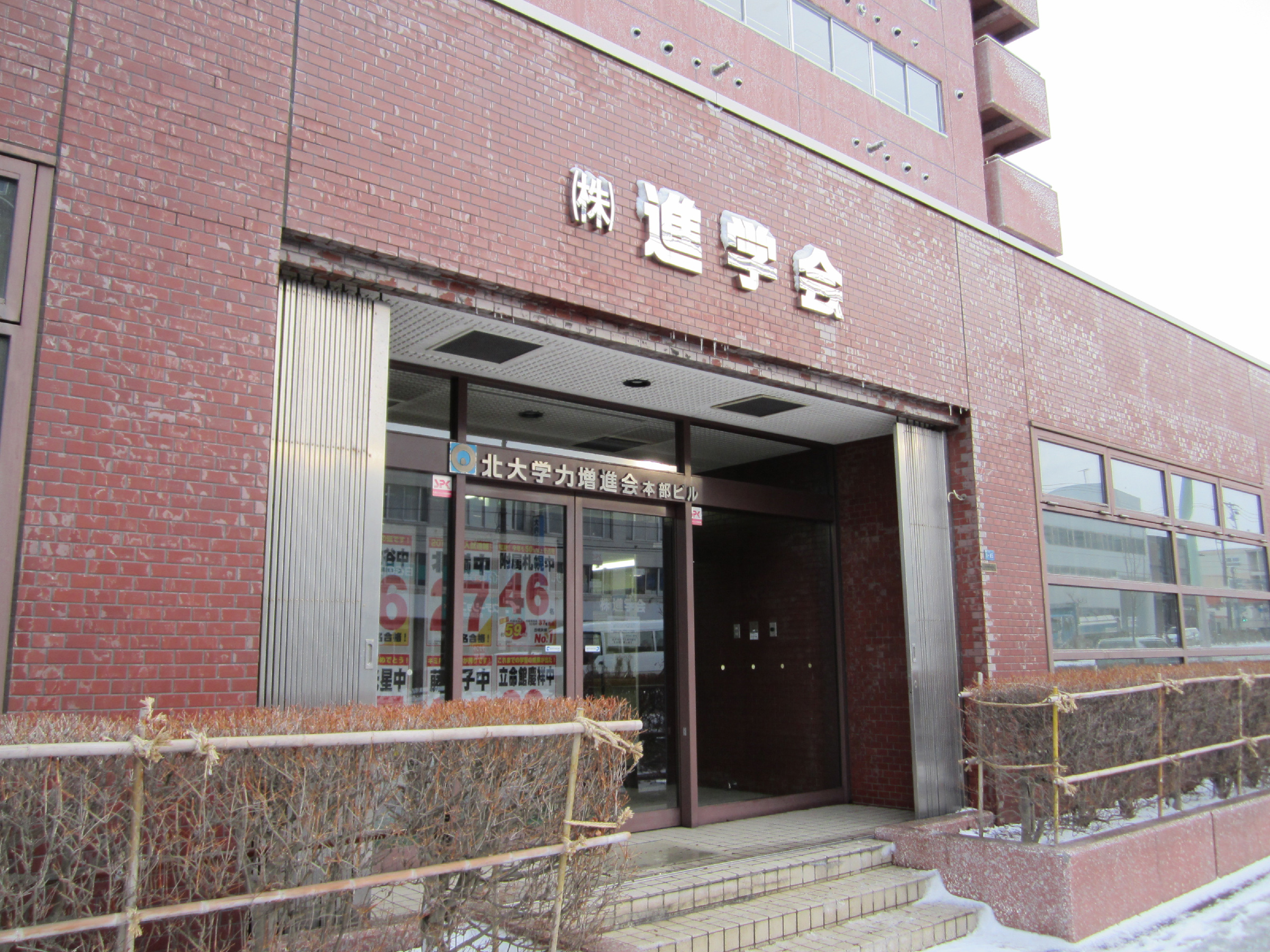 株式会社進学会本社（北海道札幌市白石区）